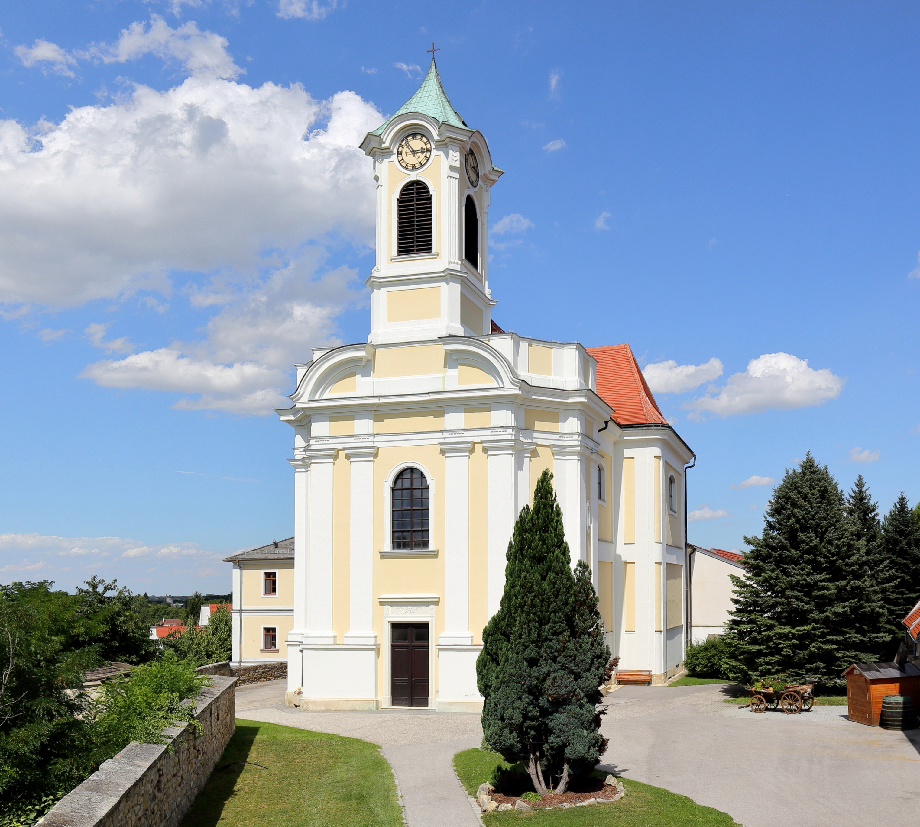 Südwestansicht der röm.-kath. Pfarrkirche Zur Unbefleckten Empfängnis der burgenländischen Gemeinde Wimpassing an der Leitha. Der einheitliche Barockbau mit kreuzförmigen Grundriß wurde anstelle einer 1683 zerstörten Kirche errichtet und 1723 geweiht.